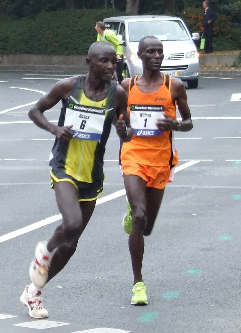 Hosea Rotich und Wilfred Kigen, beim Frankfurt-Marathon, 2007 in Ffm